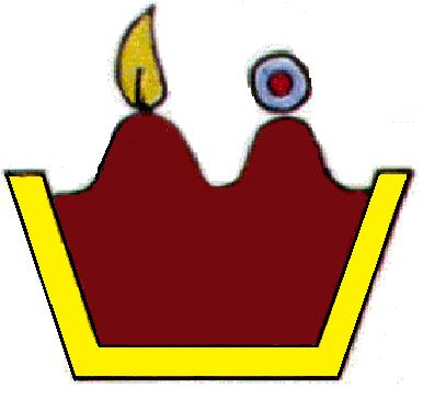 Escudo del municipio de Atlatlahucan, Morelos.